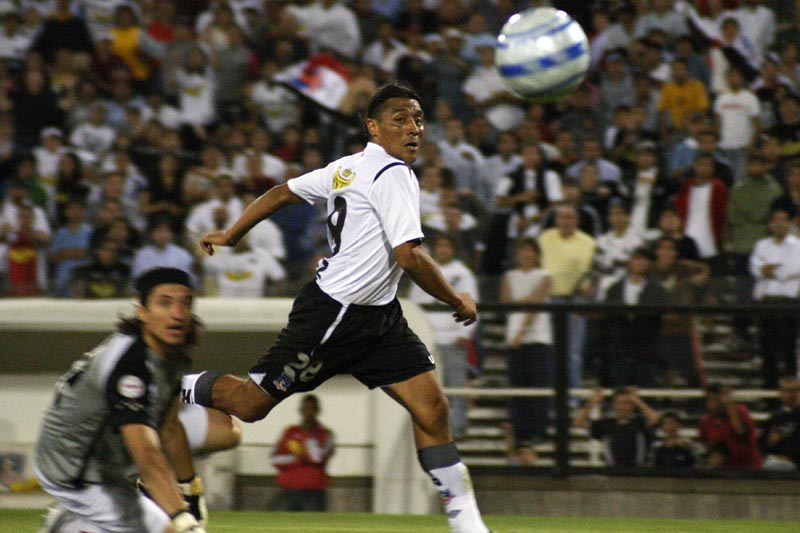 Rodrigo Melendez